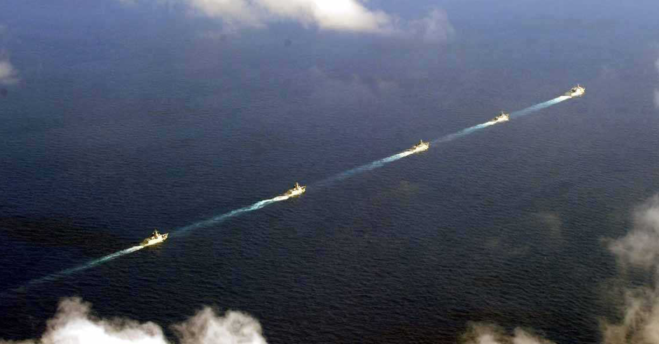 ５月６日（日）午前６時頃、海上自衛隊第５航空群（那覇）所属「Ｐ－３Ｃ」が、沖縄本島の南西約６５０ｋｍの海域を太平洋に向けて南東進する中国海軍のルーヤンI級ミサイル駆逐艦２隻、ジャンカイII級フリゲート２隻及びユージャオ級揚陸艦１隻の合計５隻を確認した。 このうち、ルーヤンI級ミサイル駆逐艦及びユージャオ級揚陸艦は、海上自衛隊において初めて確認したものである。また、沖縄本島南西約６１０ｋｍの海域において艦載ヘリコプターの飛行及び陣形運動を行っていたことが確認されている。